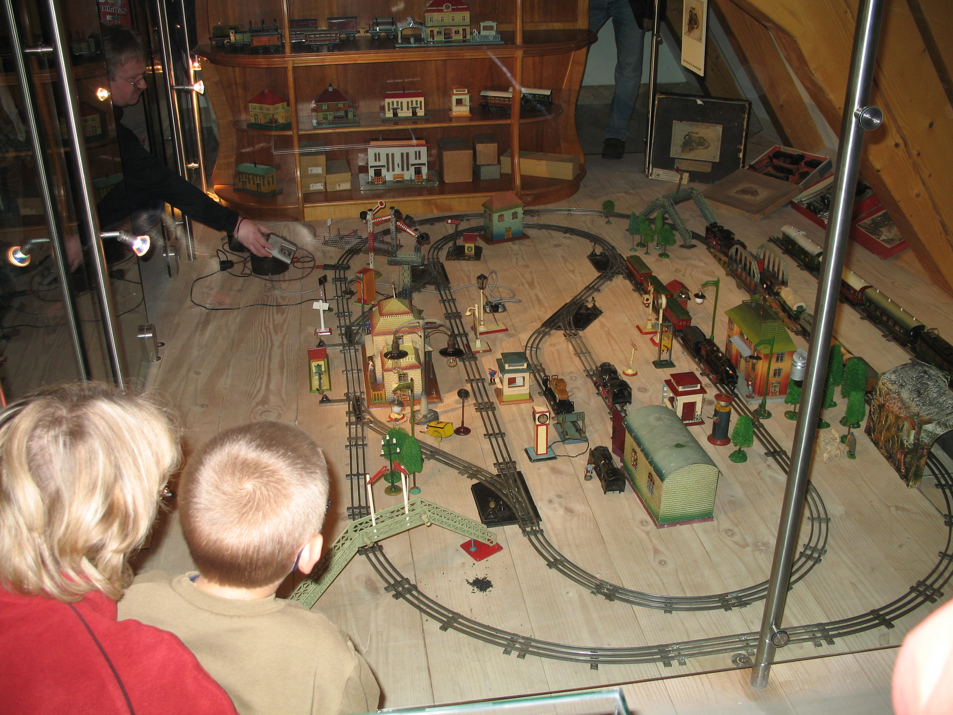 kleine Anlage der Ausstellung im Stadtmuseum Jena "Faszination Blecheisenbahnen - Erzeugnisse der Firma Kraus Fandor, Nürnberg"